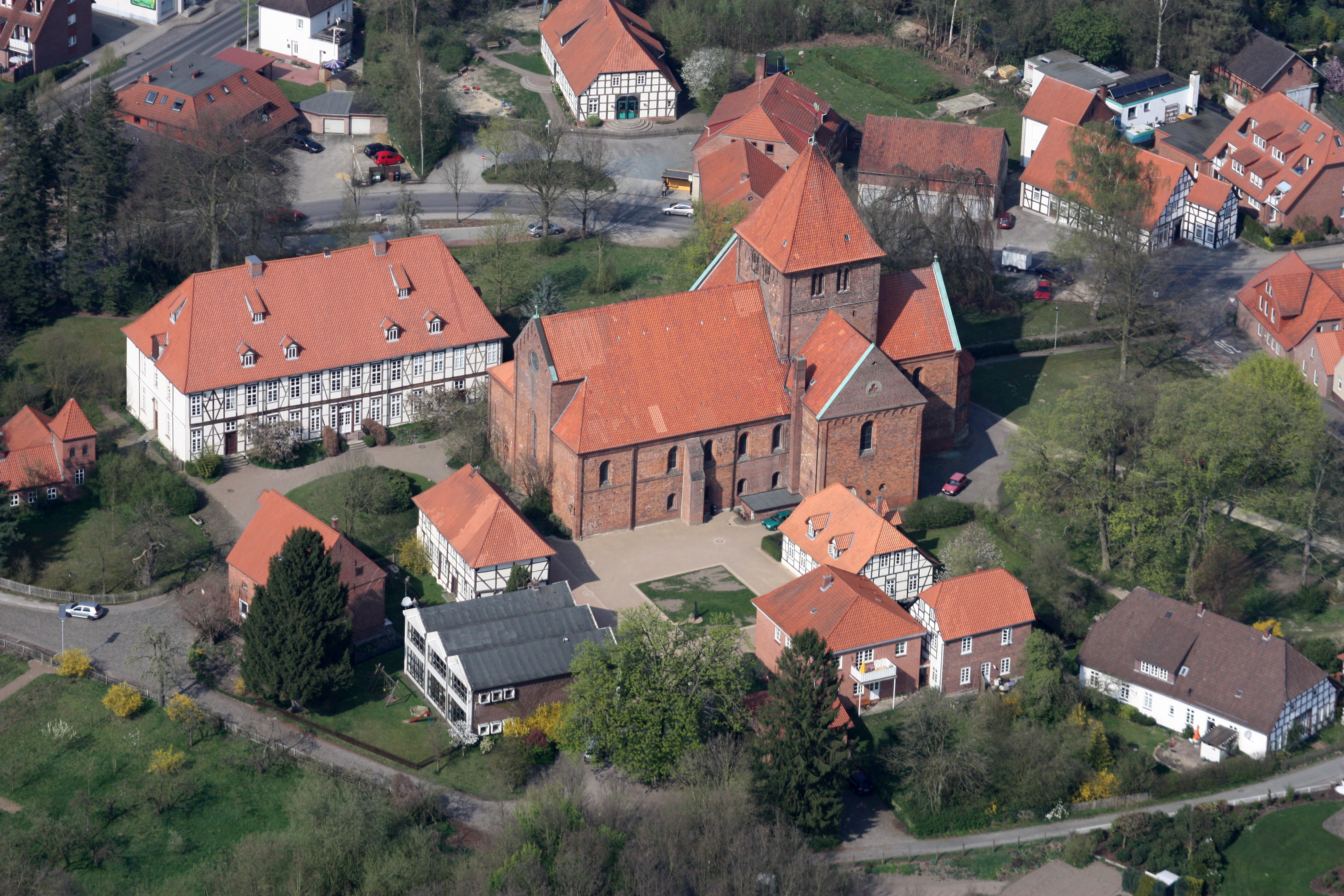 Luftbilde von Bassum